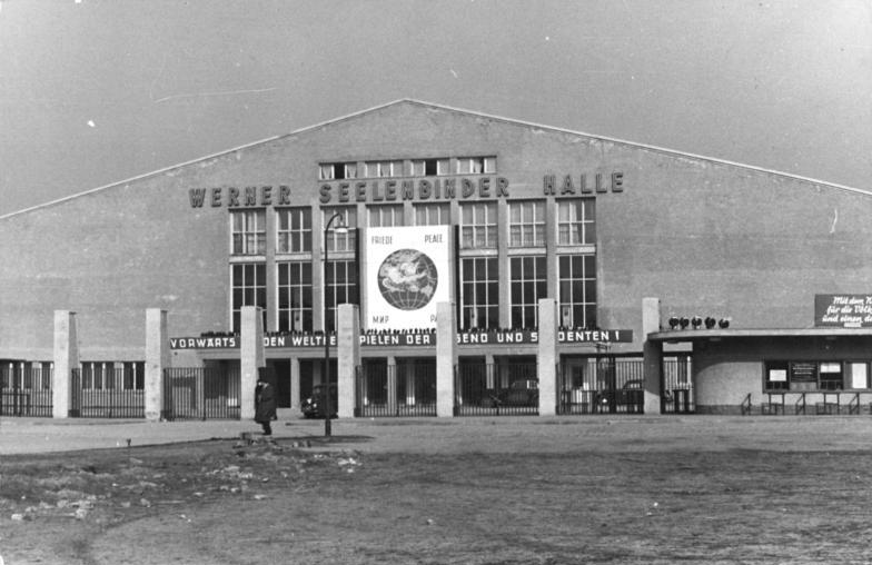 Berlin, Werner-Seelenbinder-Halle Illus Funck 8.3.1951 Berlin 1951. Blick auf die Werner-Seelenbinder-Halle.